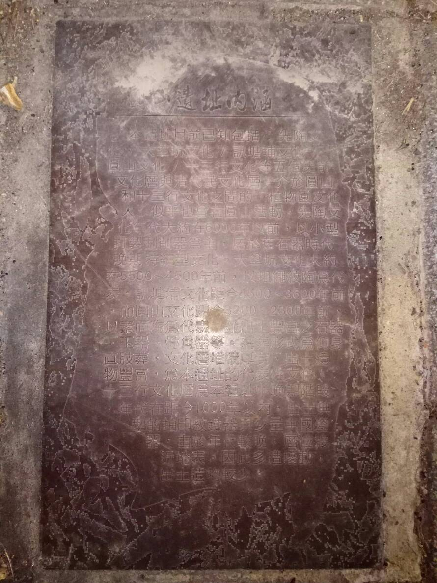 臺北市圓山捷運站外往淡水方向，原兒童育樂中心外人行道